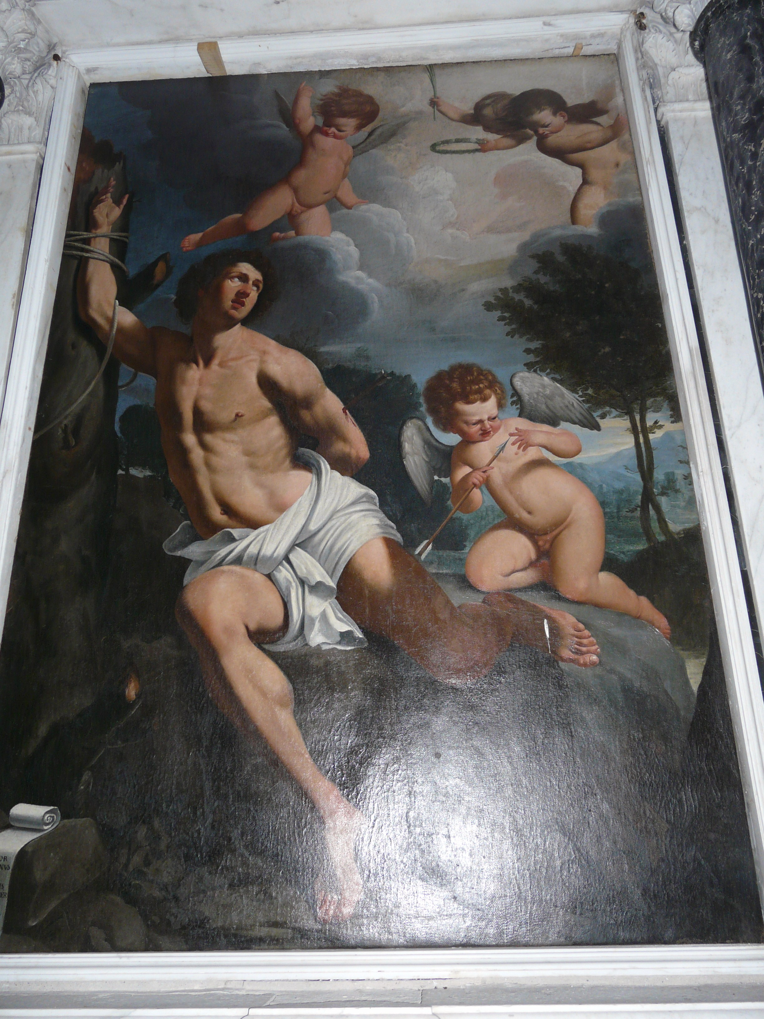 Oratorio dei Bianchi, Fosdinovo, Toscana, Italia